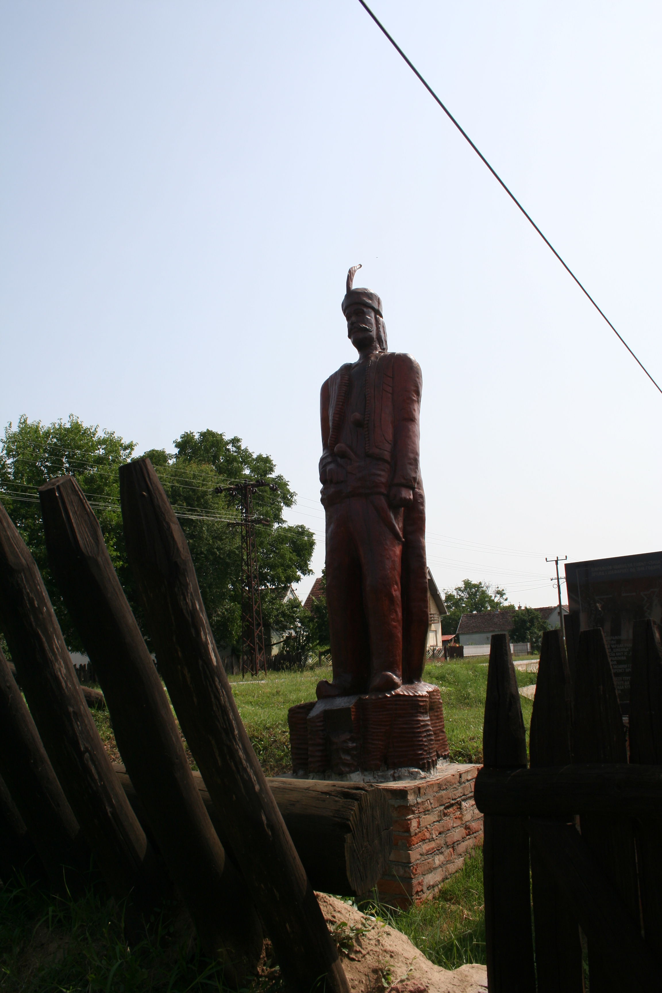 Predstava šanca iz "Boja na Ravnju", sa skulpturom Zeke Buljubaše u drvetu, Ravnje